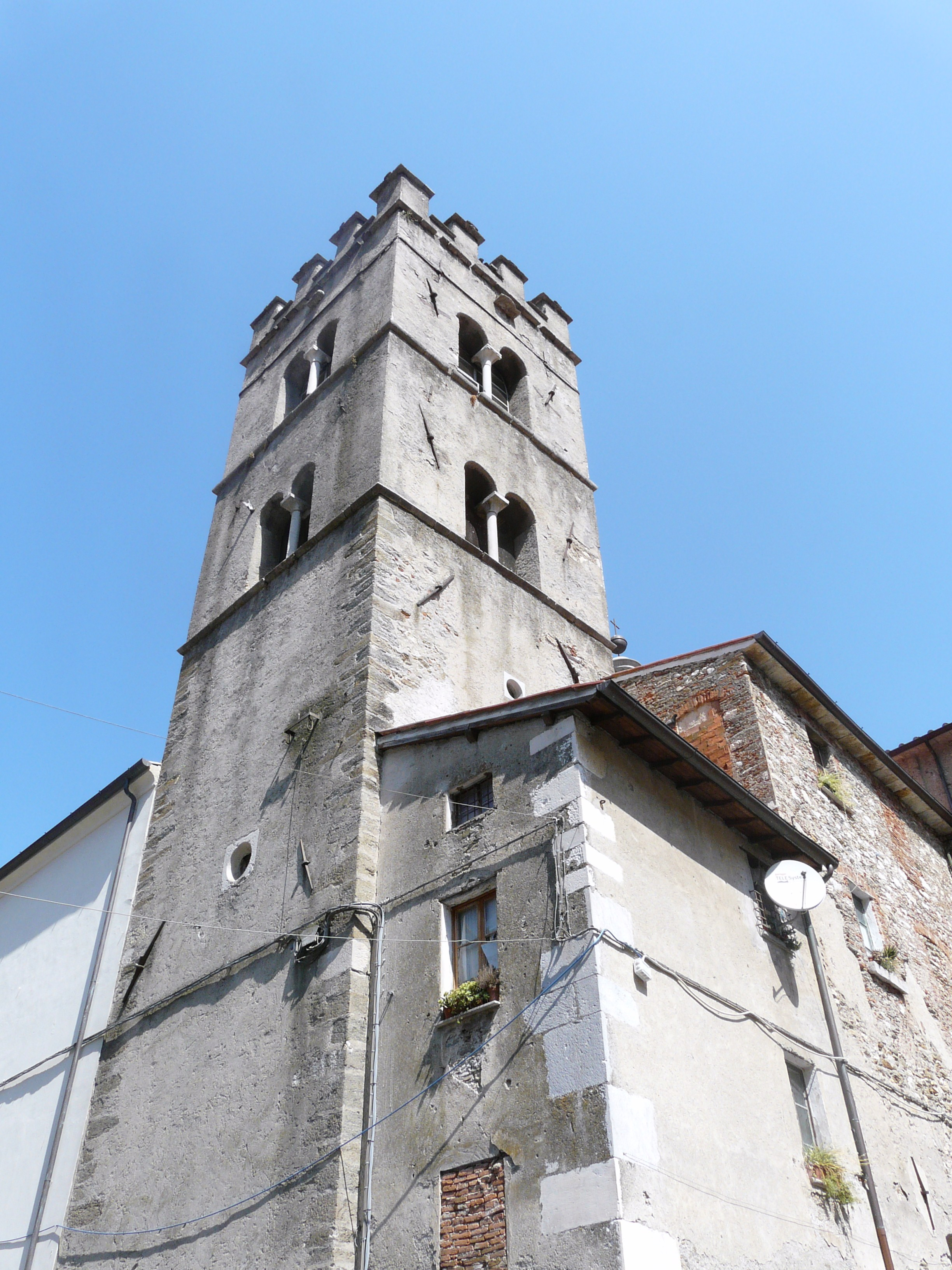 Campanile della chiesa dei santi Lorenzo e Barbara, Seravezza, Toscana, Italia